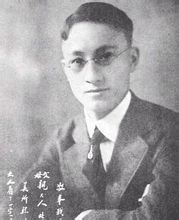 中文（中国大陆）: 徐志摩就读于上海沪江大学（今上海理工大学）